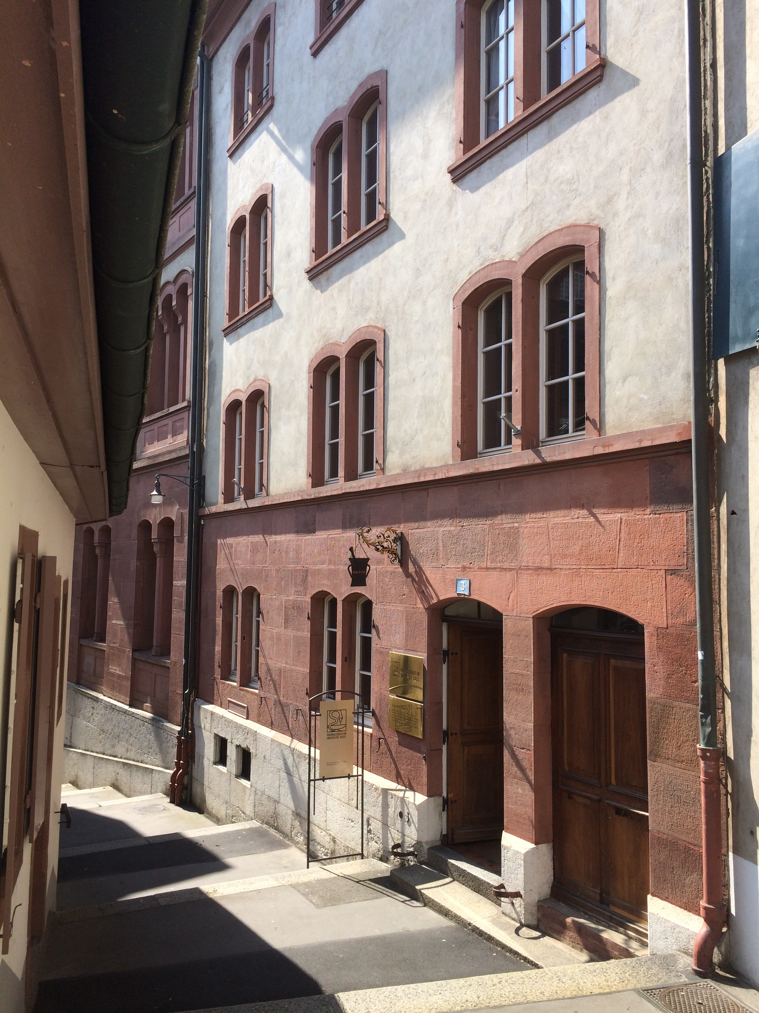 Der Eingang zum Museum am Totengässlein 3